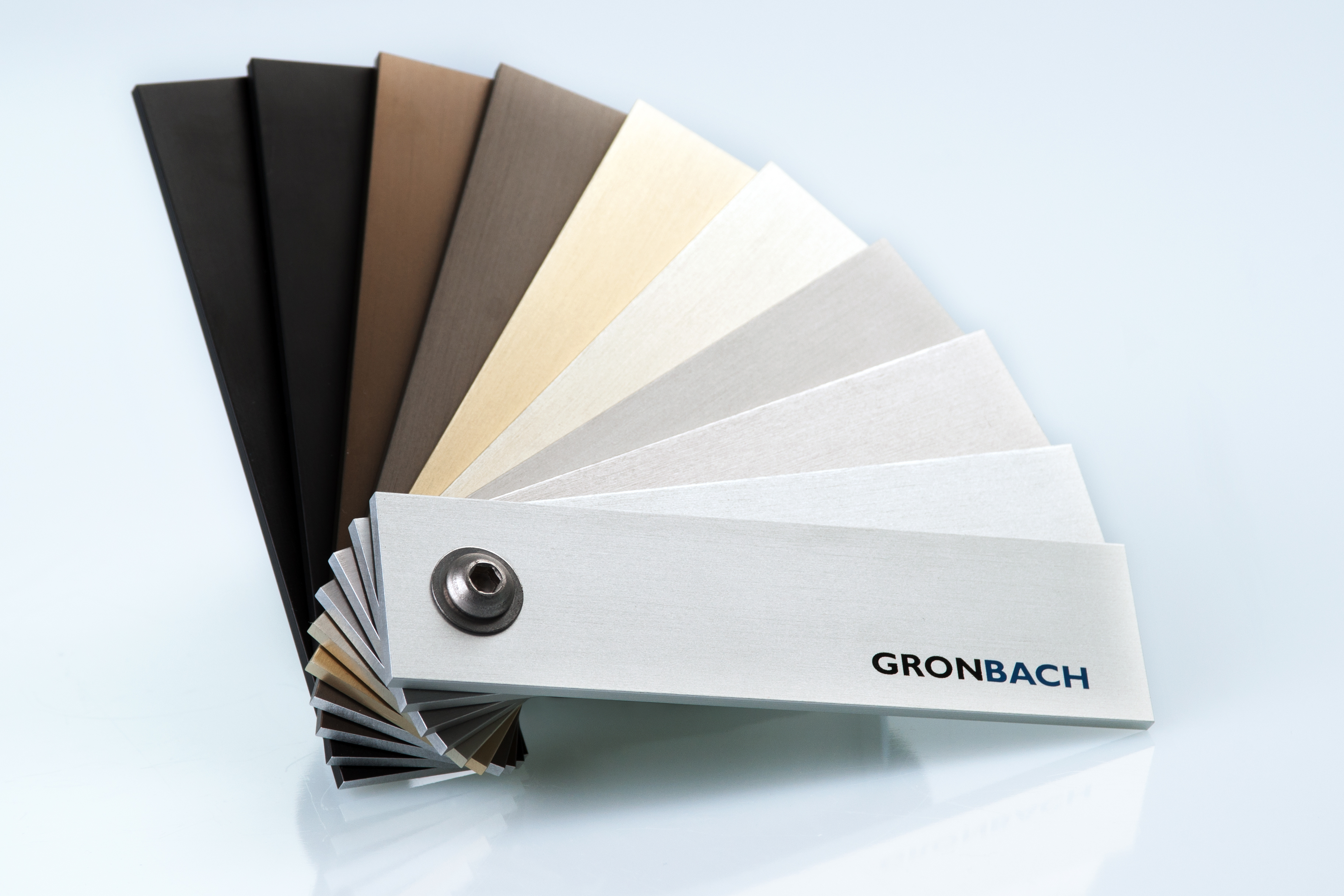 Aluminiumfarbfächer.jpg